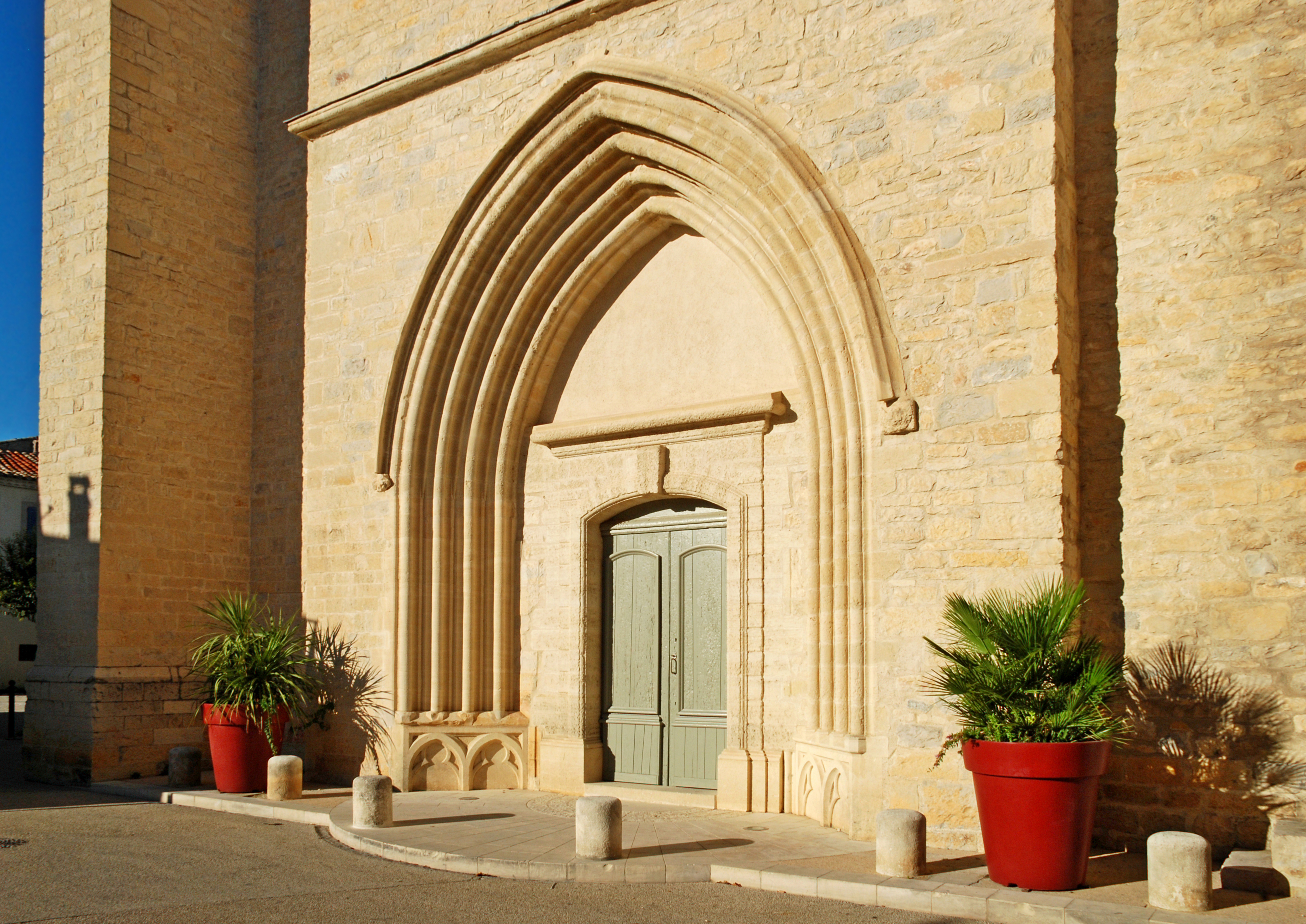 France - Gard - Église Saint-Saturnin de Calvisson